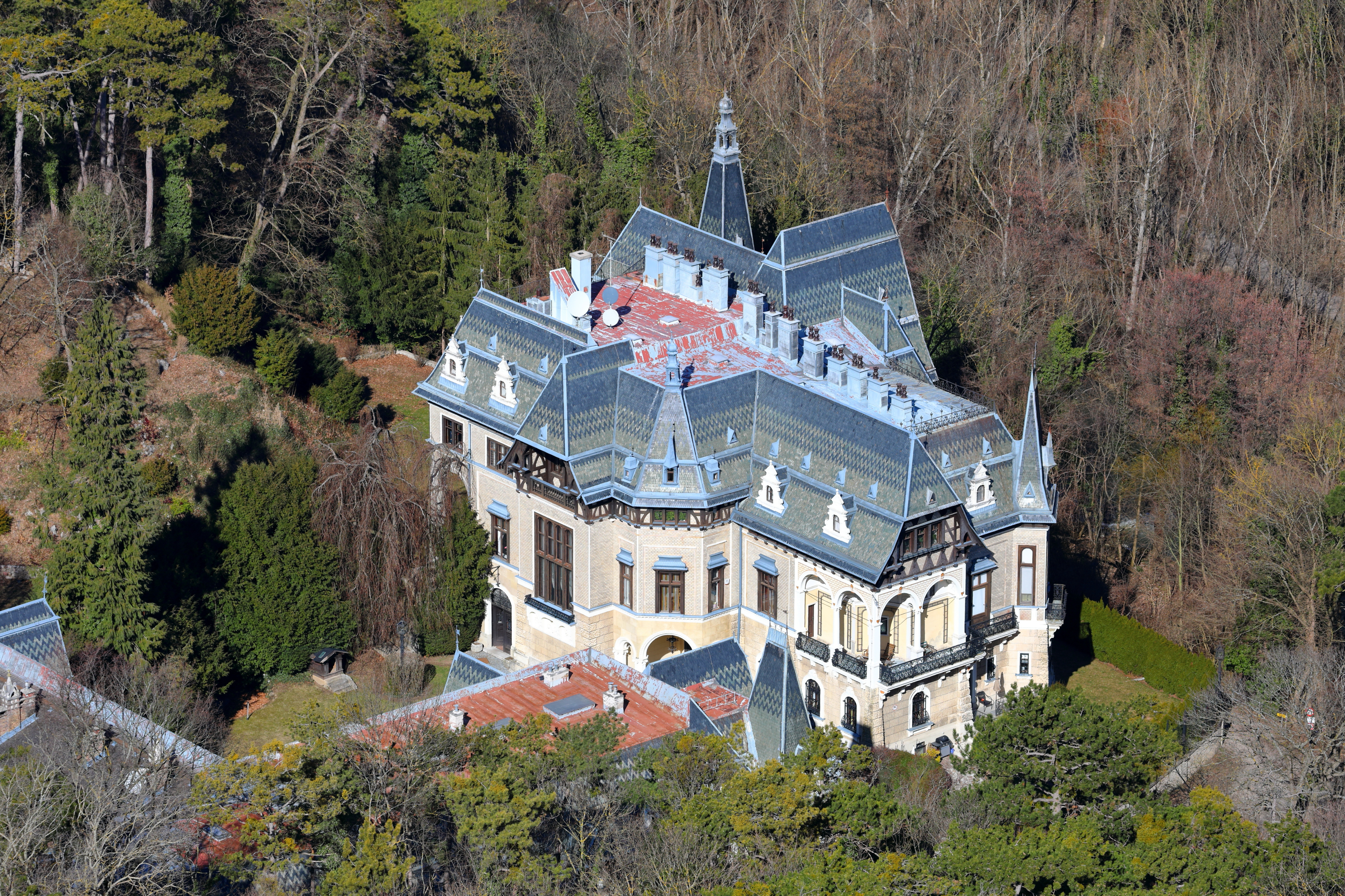 Blick von der Burgruine Rauheneck auf die Villa Eugen in der niederösterreichischen Stadtgemeinde Baden.Die Villa wurde als Jagdschloss im Auftrag von Erzherzog Wilhelm von Österreich nach Plänen des Architekten Franz von Neumann von 1884 bis 1886 errichtet. Benannt ist sie nach Erzherzog Eugen von Österreich-Teschen, der die Villa 1894 erbte.